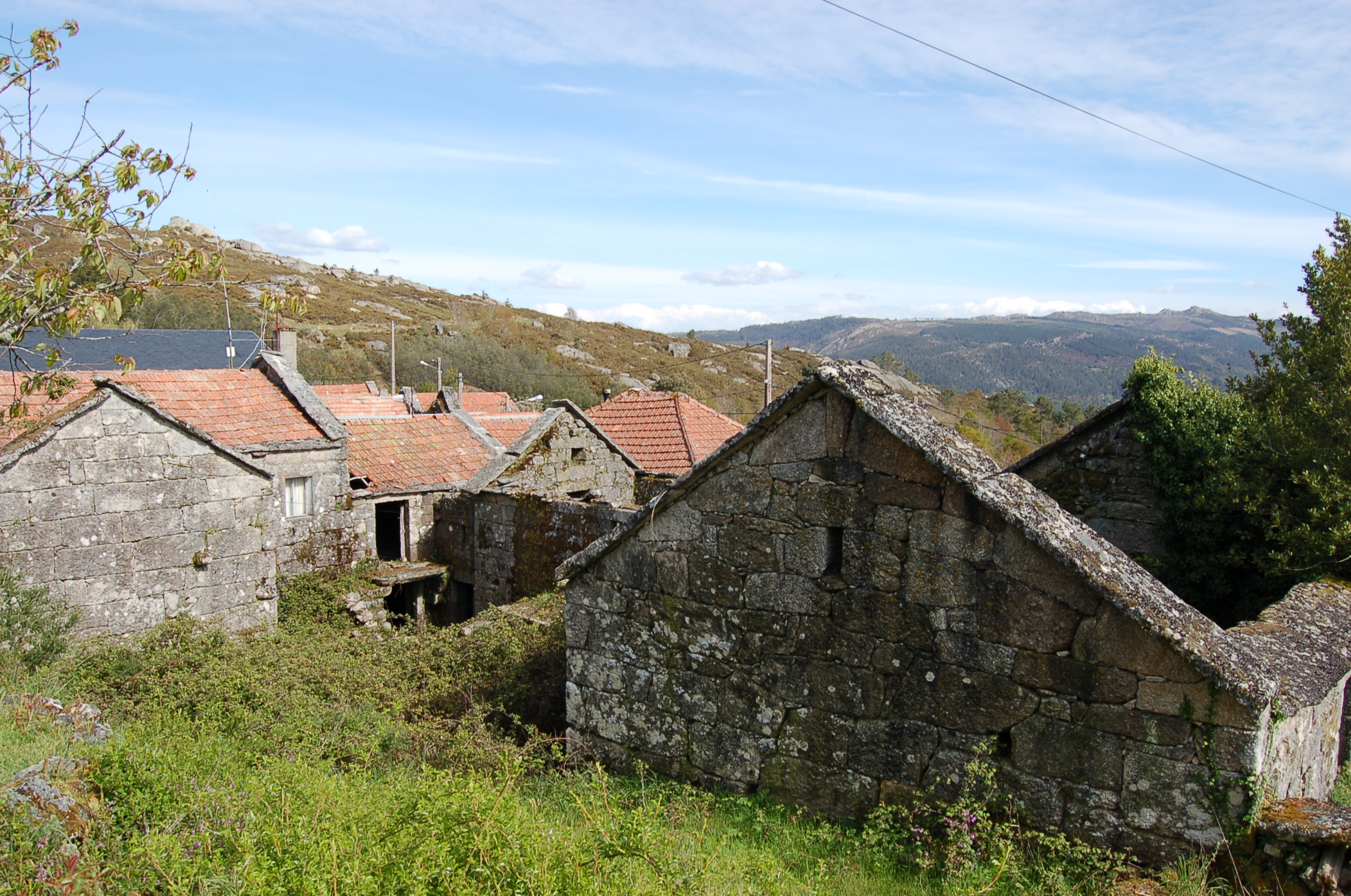 Vivendas na aldea de San Vicenzo, na parroquia de Avión, no concello de Avión